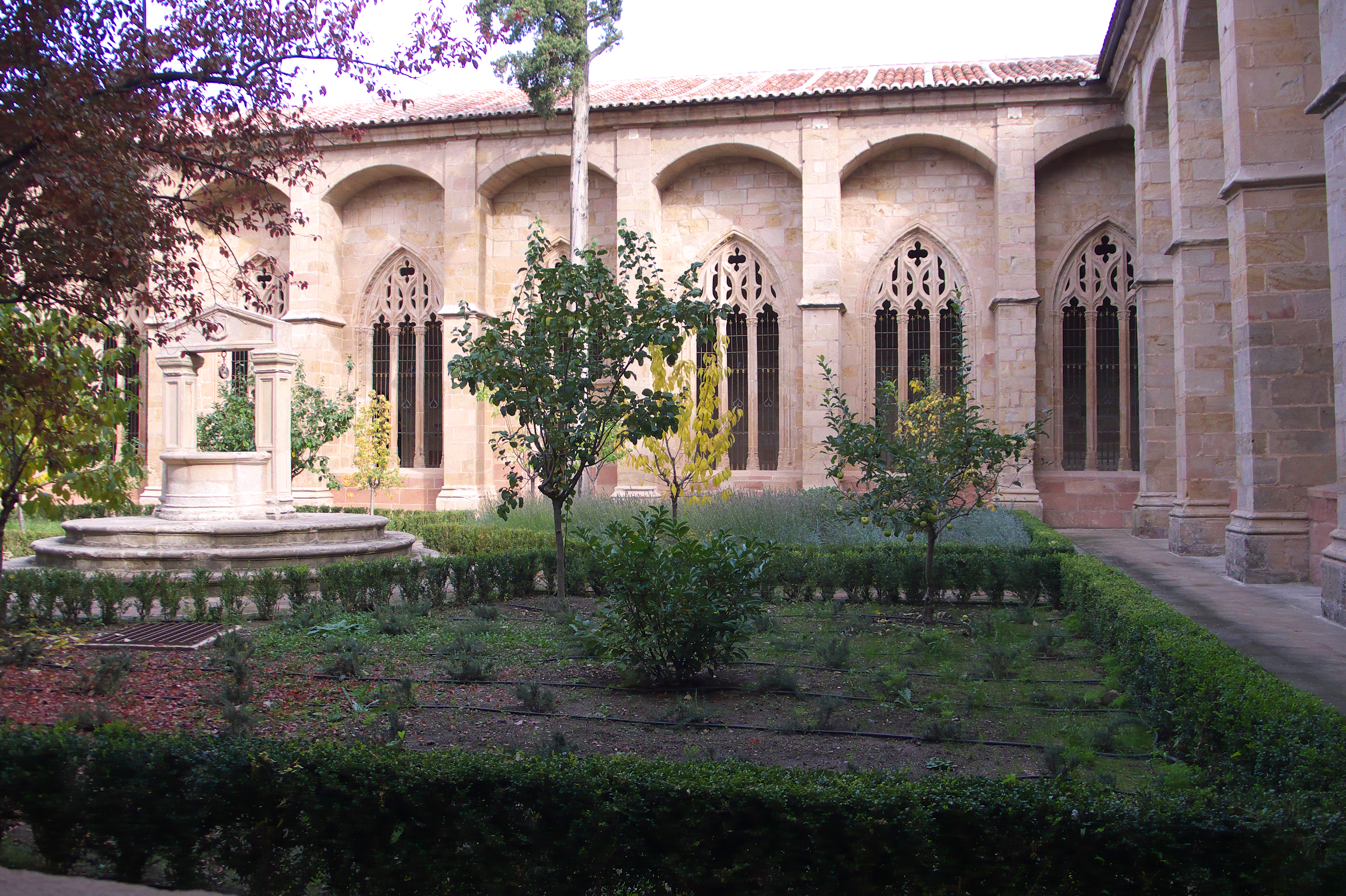 Principios del siglo XVI